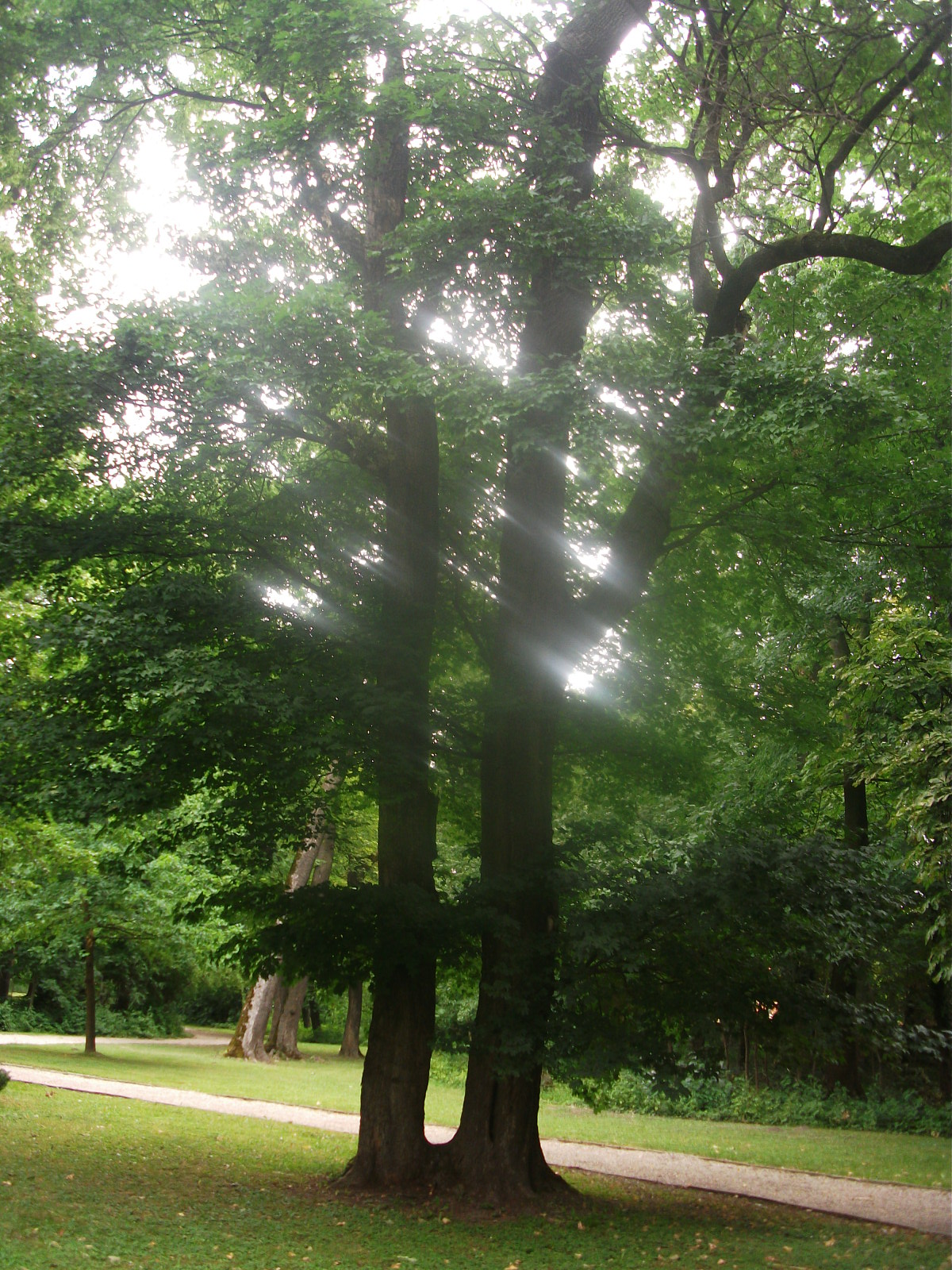 A Hédervári-kastély udvara. A két fa a gyökerénél "össze van nőve". :-)